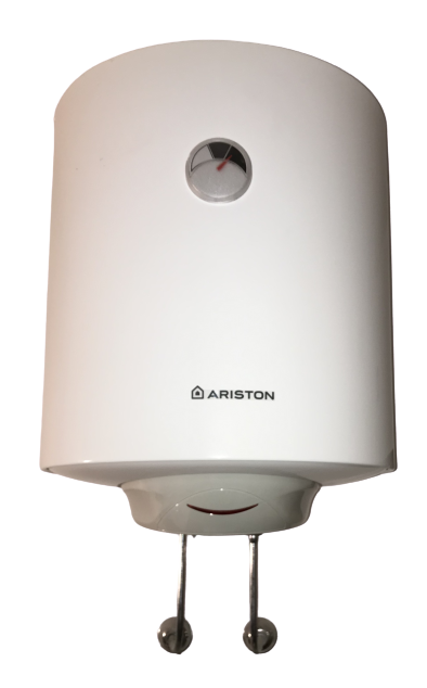 Scaldabagno